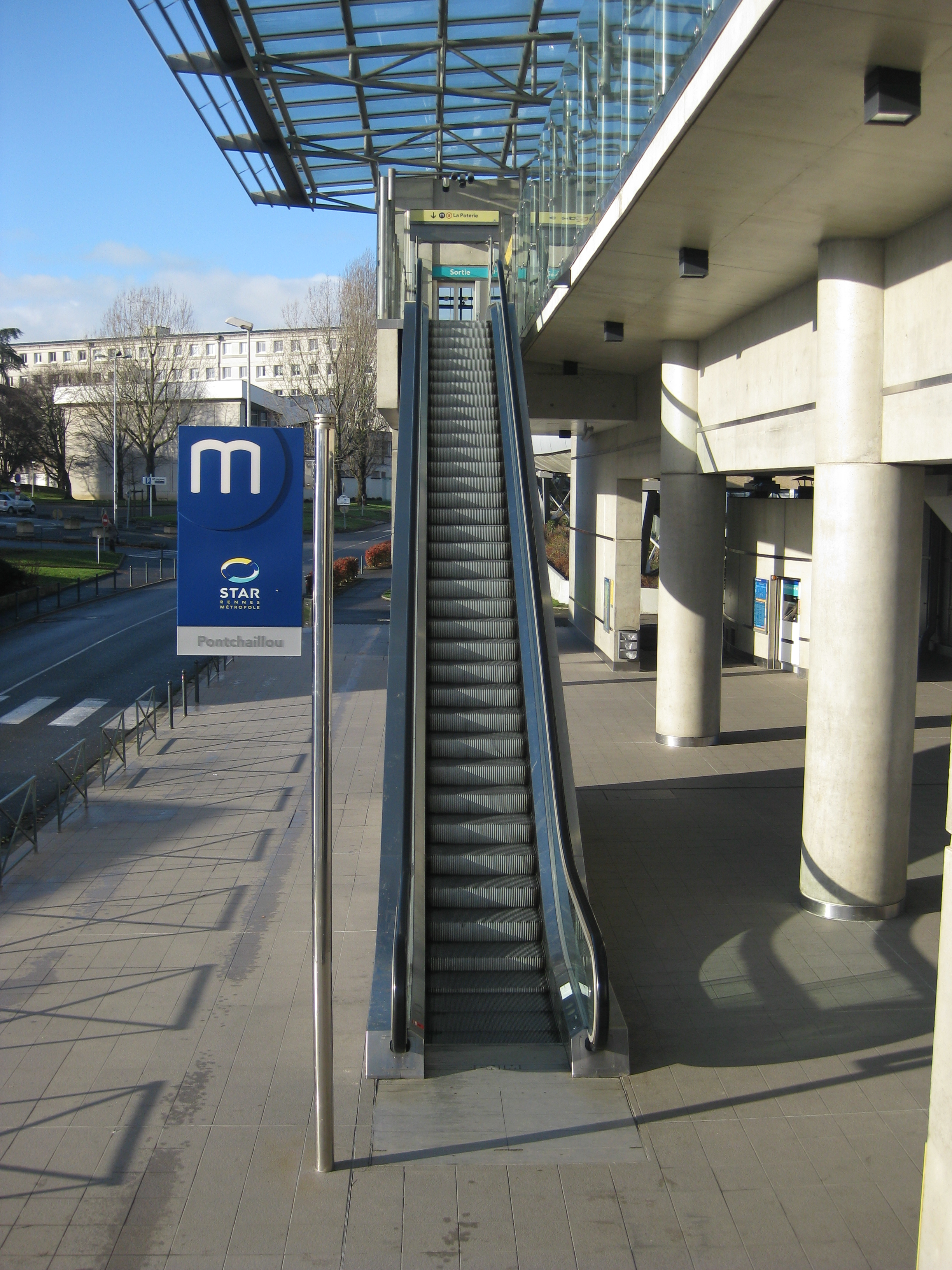 Entrée de la station de métro Pontchaillou à Rennes, escalator direction la Poterie